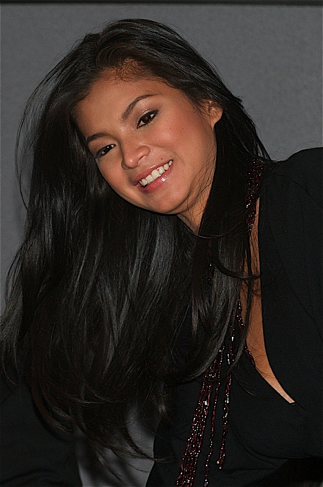 Angel Locsin, Filipino actress